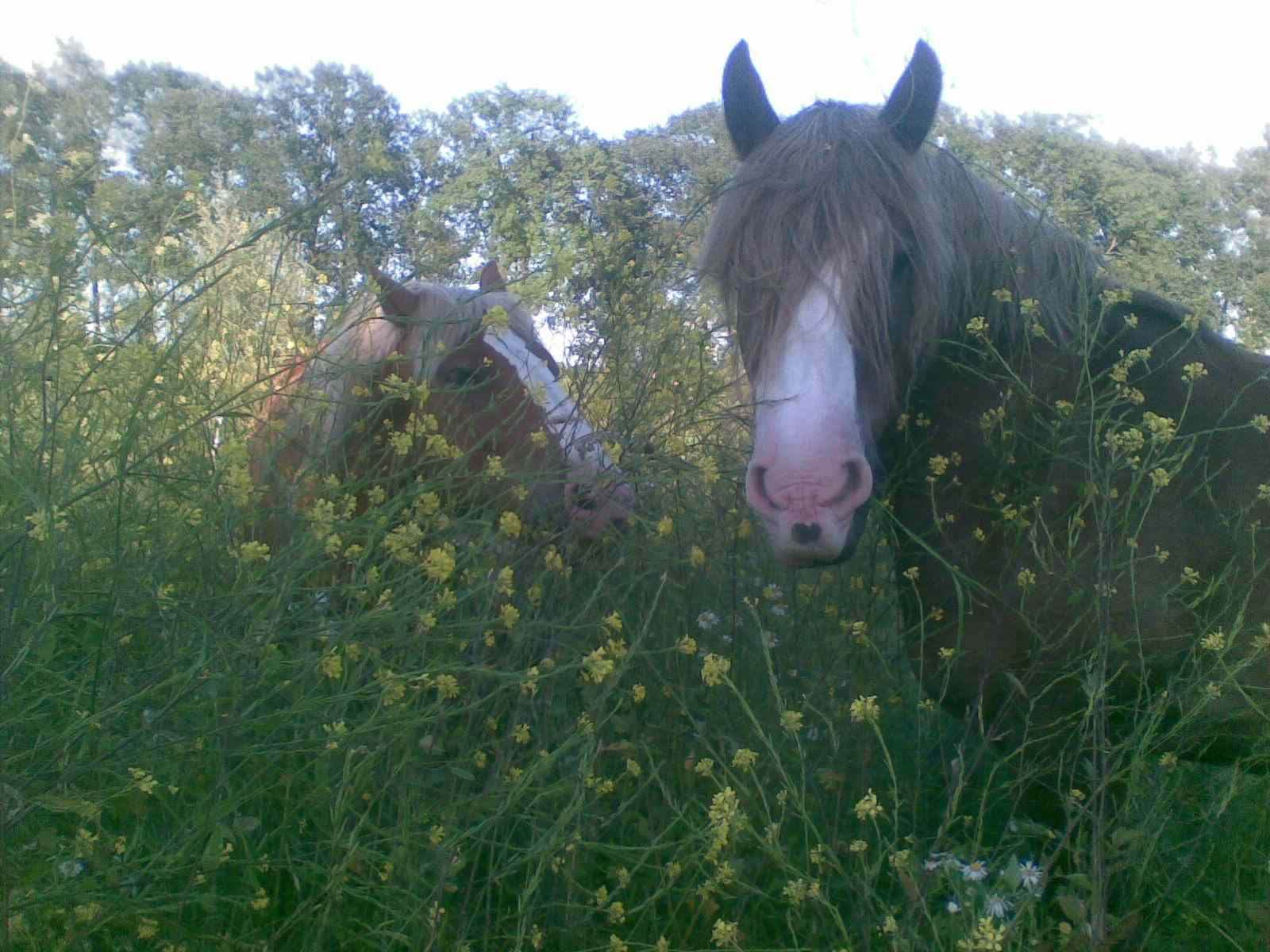 Schwarzwälder Fuchs merrie en ruin in veld met koolzaad in Leersum